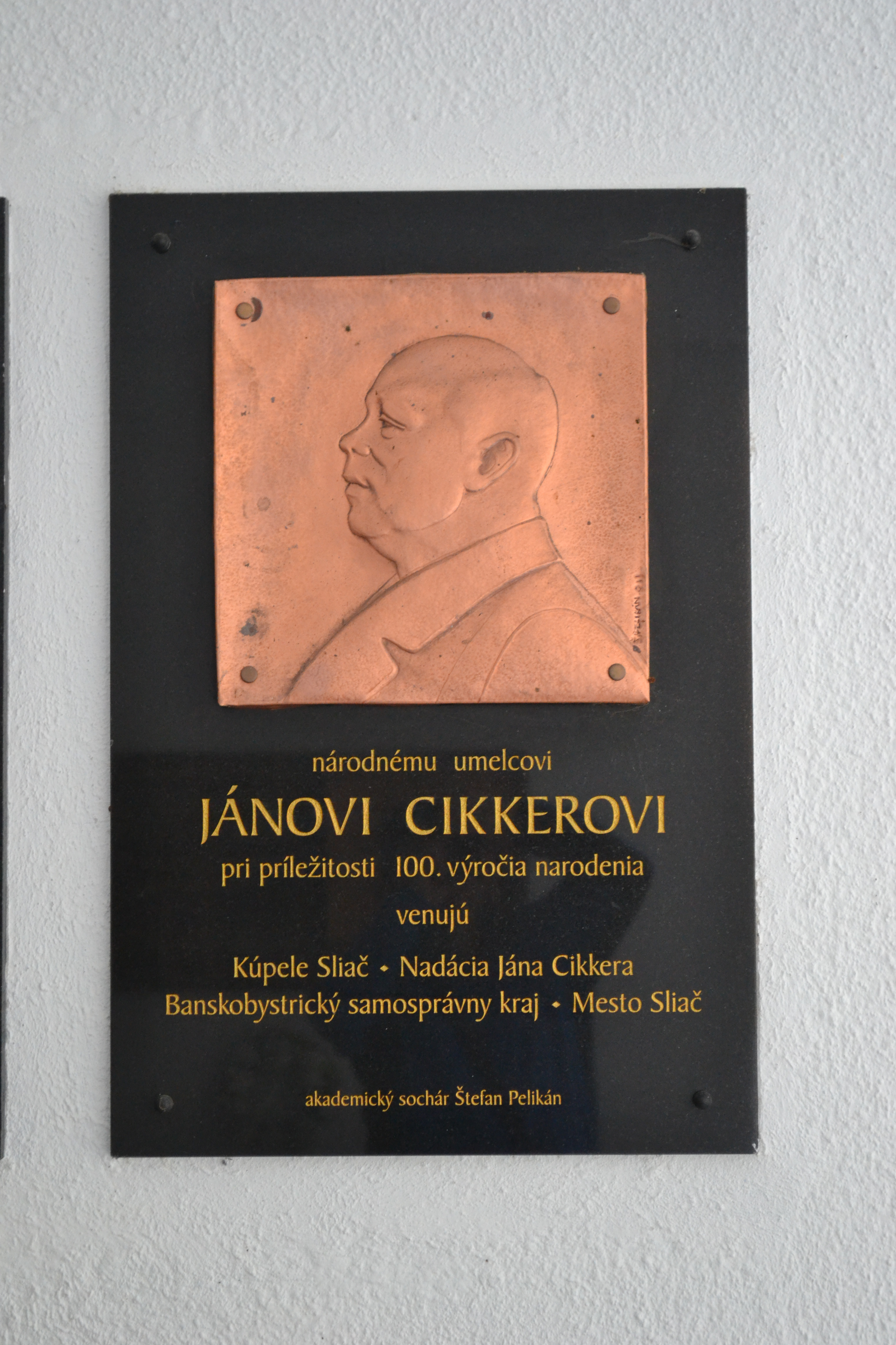 Pamätná tabuľa Jána Cikkera v kúpeľoch Sliač.